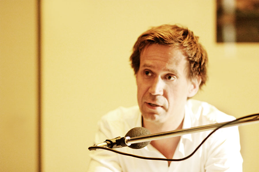 Volker Weidermann, Mülheim a.d. Ruhr MedienHaus, 11.November 2013. Lesung aus "Das Buch der verbrannten Bücher"